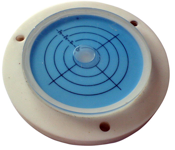 Dosenlibelle